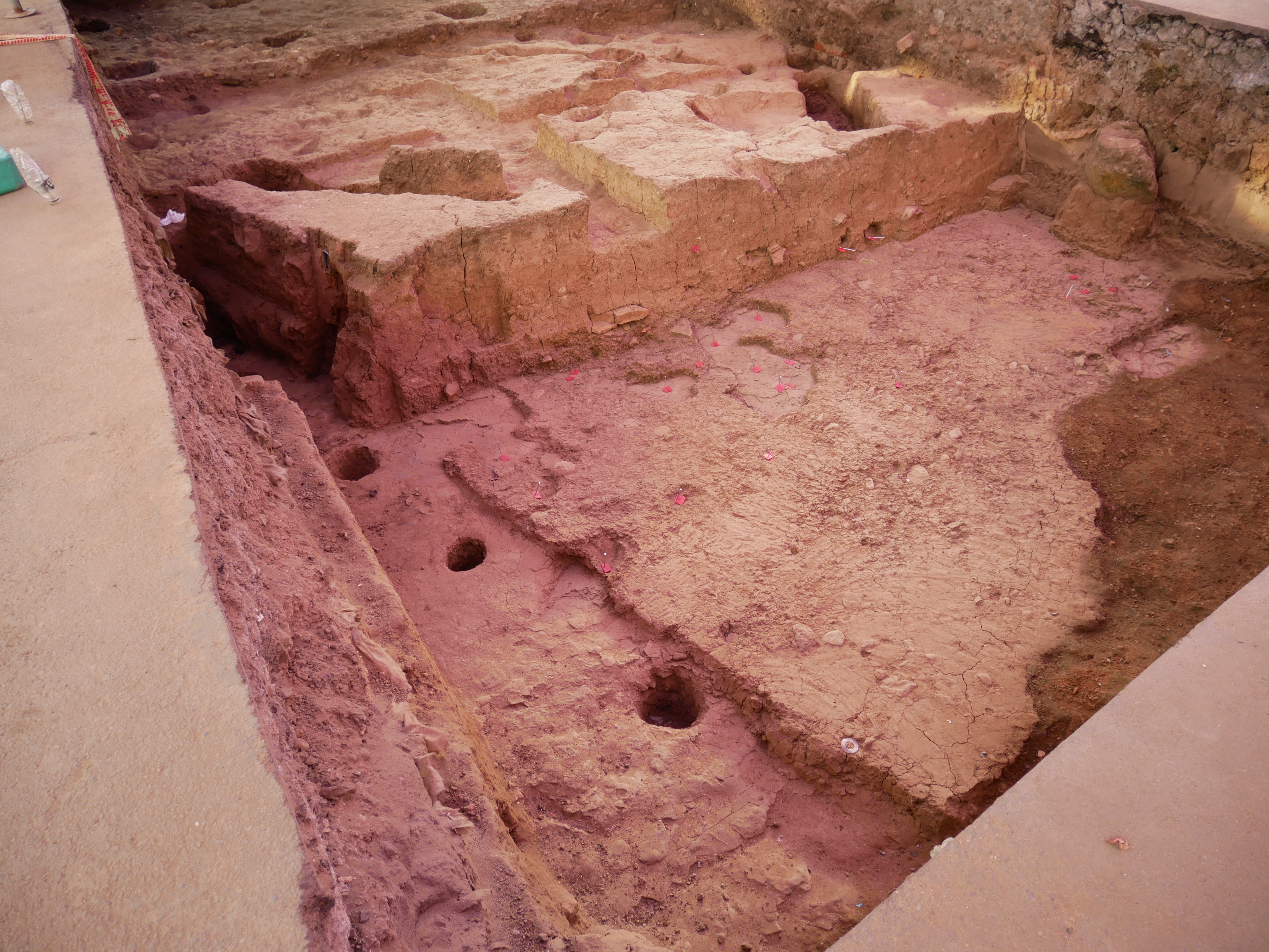 諸聖堂（Todos los Santos）考古發掘坑，基隆市中正區社寮里